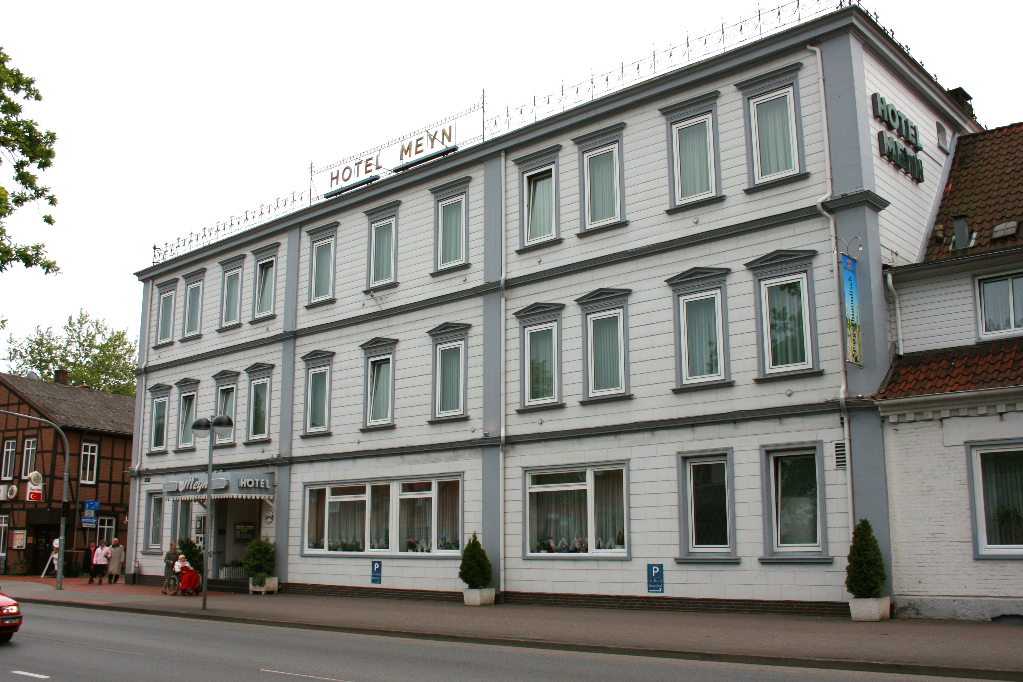 Poststraße in Soltau